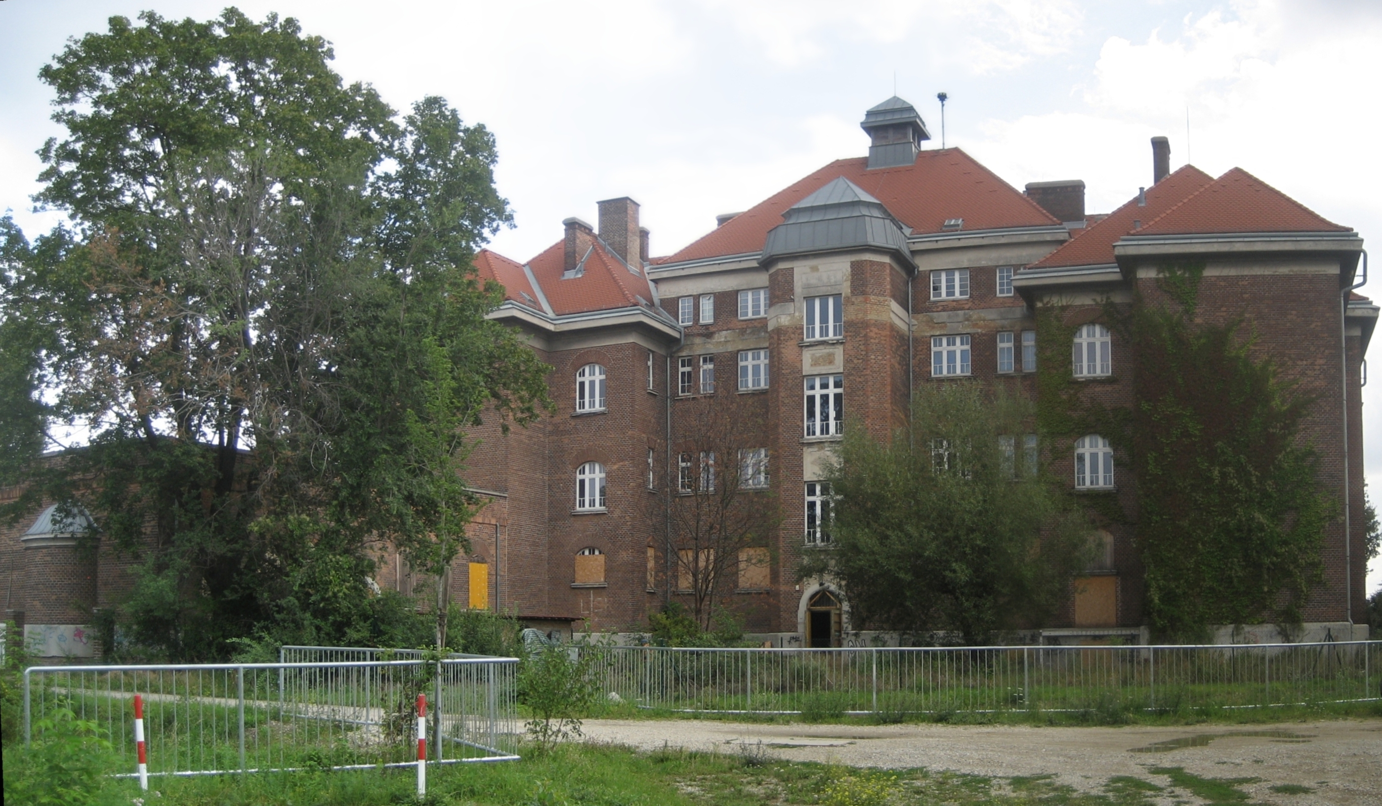 die Rückseite des Hauses Triester Straße 114 in Favoriten, in Wien; Panoramabild erstellt mit der Demoversion von Autostitch 2.2 (hier erhältlich: NOTE: This image is a panorama consisting of multiple frames that were merged or stitched in software. As a result, this image necessarily underwent some form of digital manipulation. These manipulations may include blending, blurring, cloning, and color and perspective adjustments. As a result of these adjustments, the image content may be slightly different than reality at the points where multiple images were combined. This manipulation is often required due to lens, perspective, and parallax distortions.